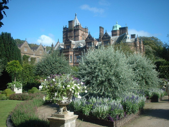 Holker Hall and gardens